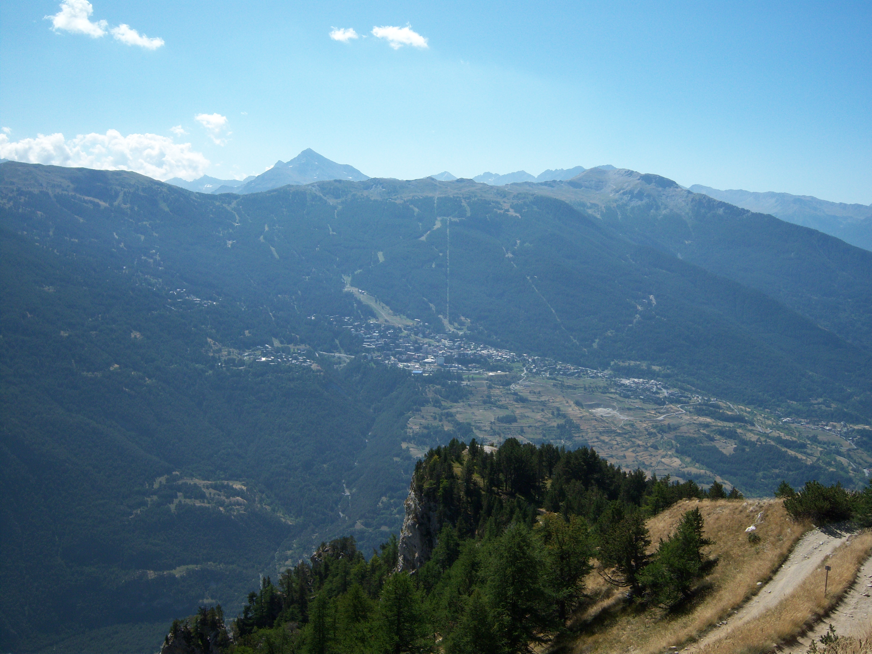 Osservatorio artiglieri con postazione semi-permanente della Batteria Pramand